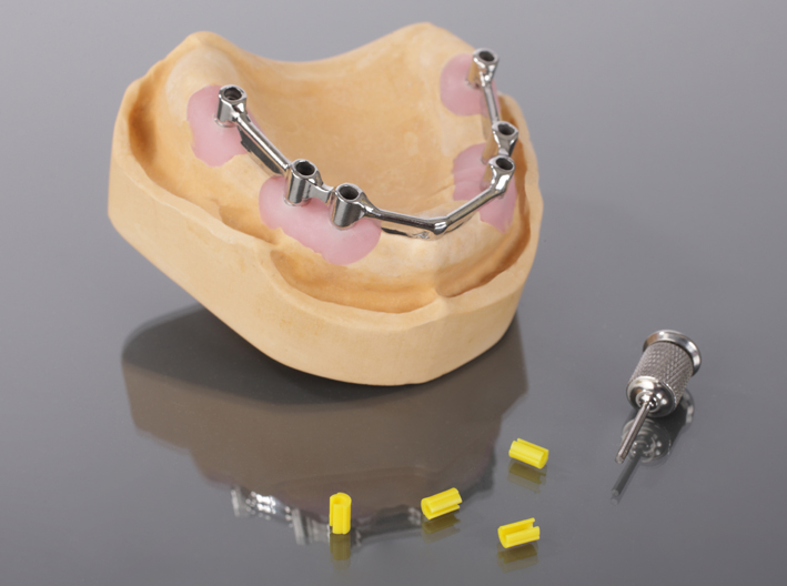 Zahnersatz Stegarbeit aus dem implantologischen Bereich